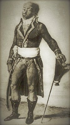 Toussaint Louverture lors de son arrivée à Brest en 1802, gravure de Pierre-Charles Baquoy. Anneaux de la mémoire